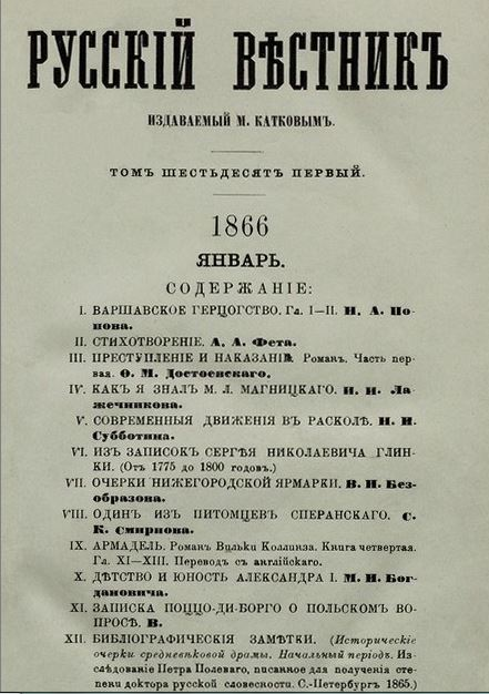 Обложка журнала "Русский вестник", 1866, № 1